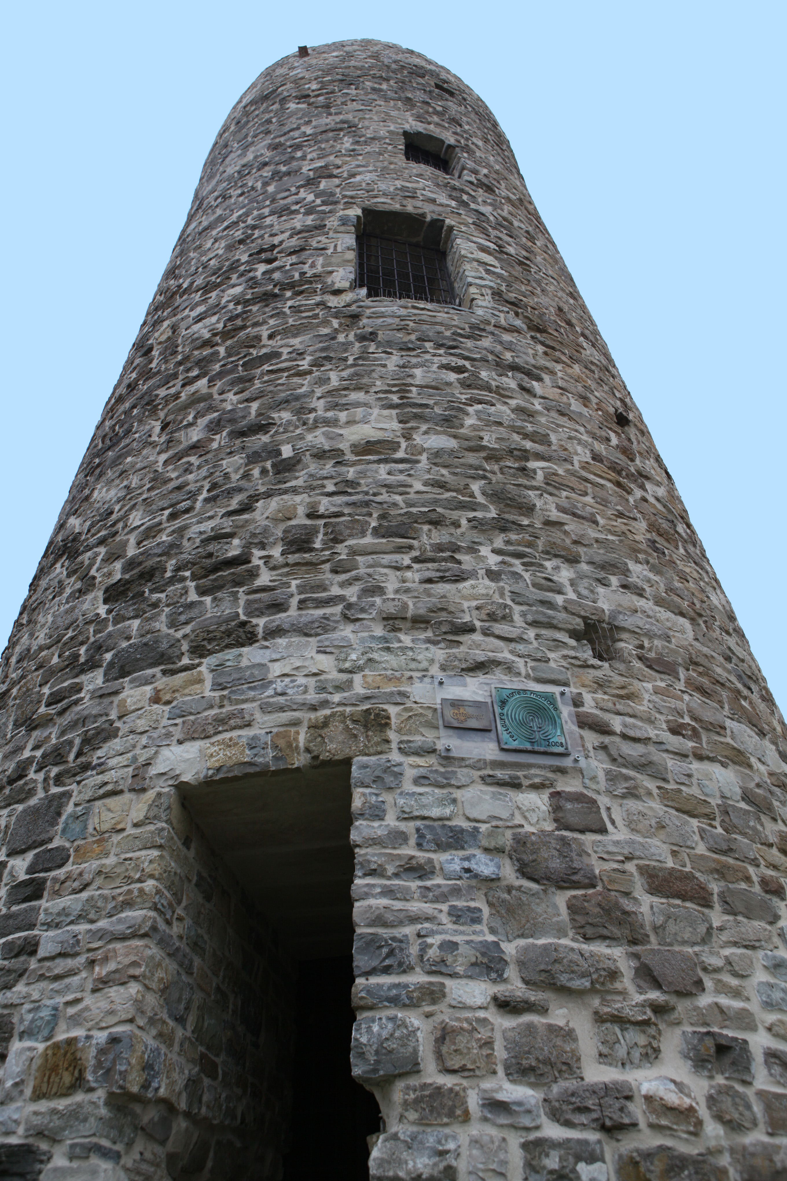 Torre di Maciano - MIBAC This is a photo of a monument which is part of cultural heritage of Italy.